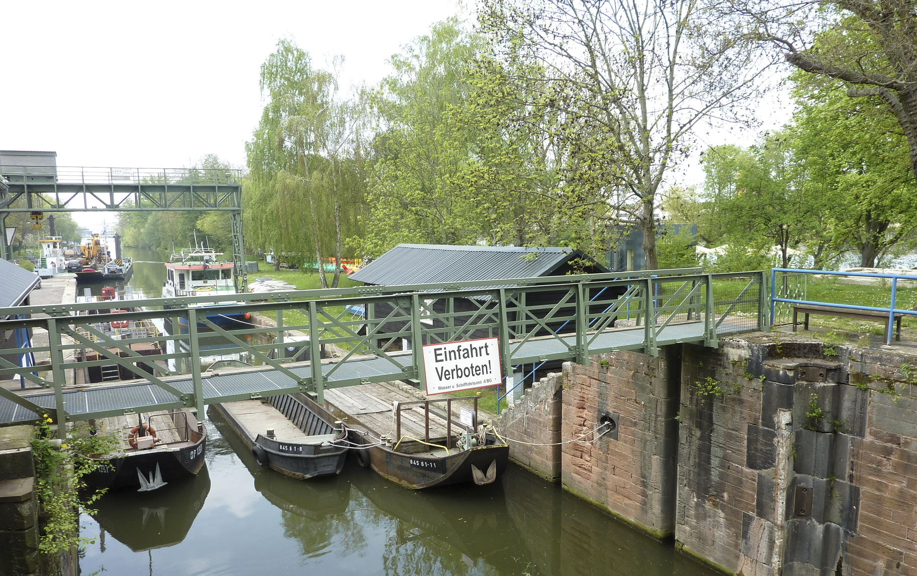 Frankfurt am Main, Stadtteil Niederrad: Das Licht- und Luftbad Niederrad ist eine städtische Grünanlage auf einer schmalen Landzunge am südlichen Mainufer. Das Foto zeigt einen Blick in die Schleusenkammer der Alten Staustufe Niederrad (auch Alte Schleuse Niederrad), auf deren Gelände das Bad (rechts im Hintergrund sichtbar) im Jahr 1900 eingerichtet worden war